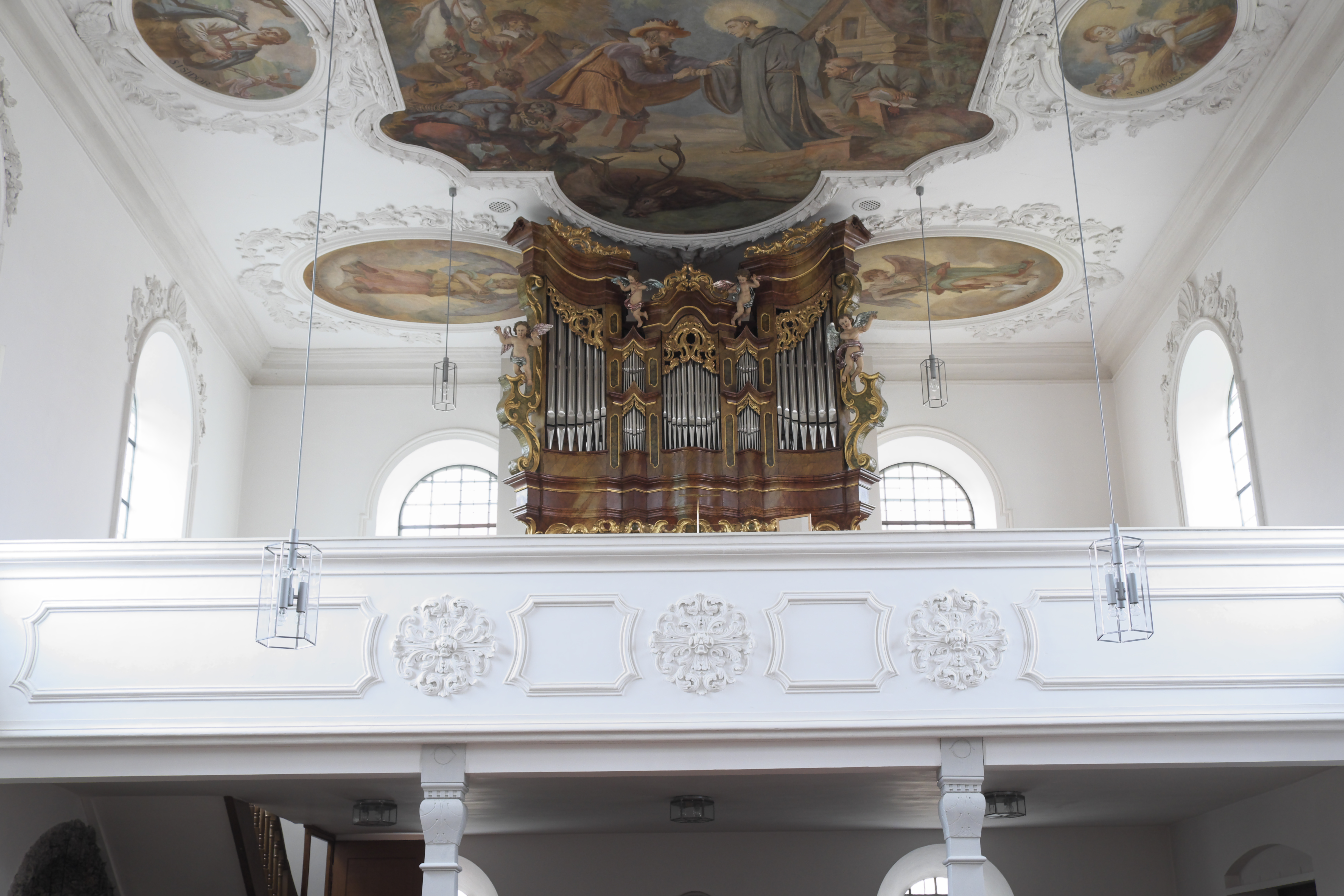 Katholische Pfarrkirche St. Leonhard in Pförring im oberbayerischen Landkreis Eichstätt (Bayern/Deutschland), Empore mit Orgel